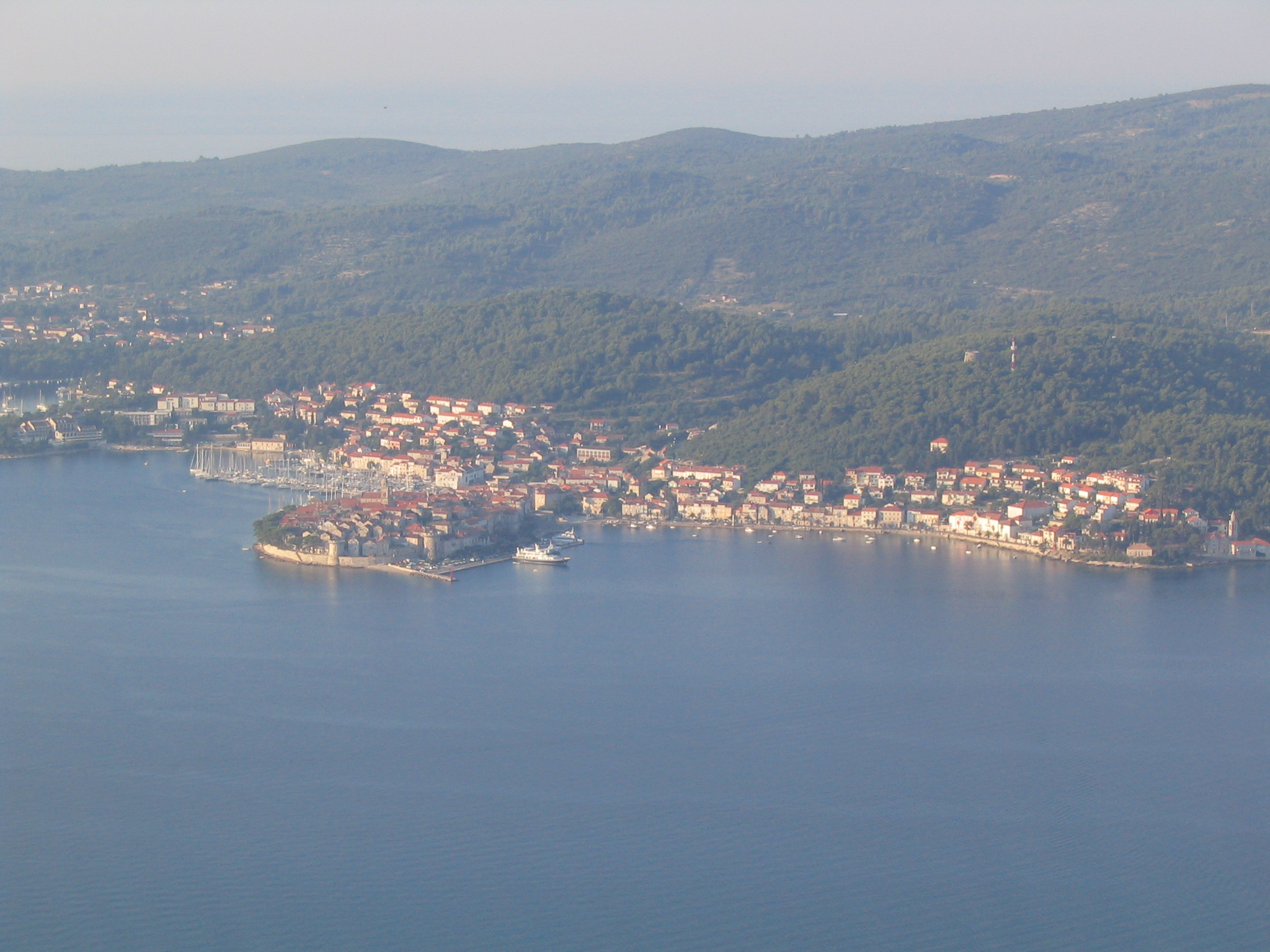 Panorama Korčule